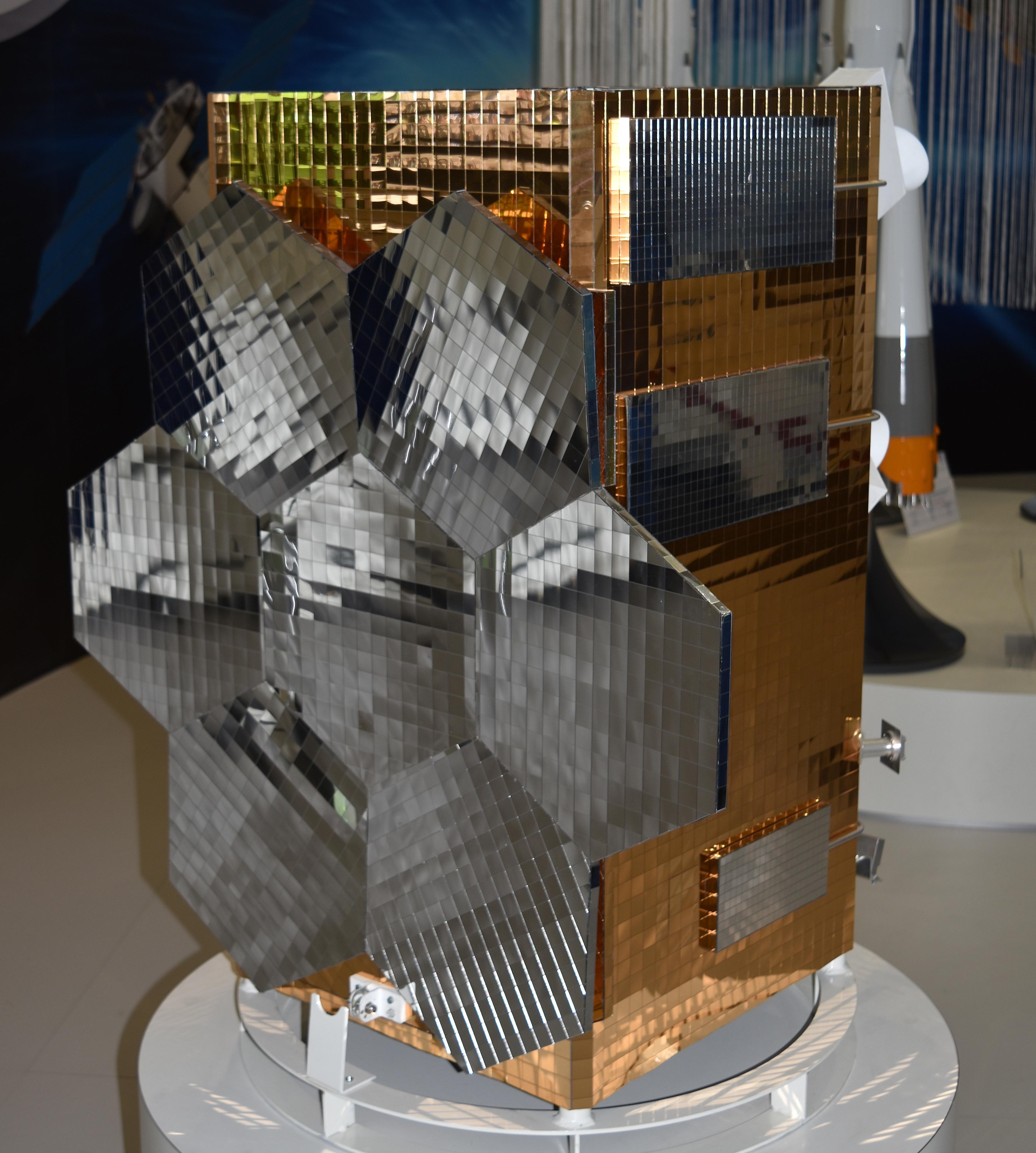 Maquete satellite MVL-300 (Mikhailo Lomonosov) , Salon du Bourget 2015